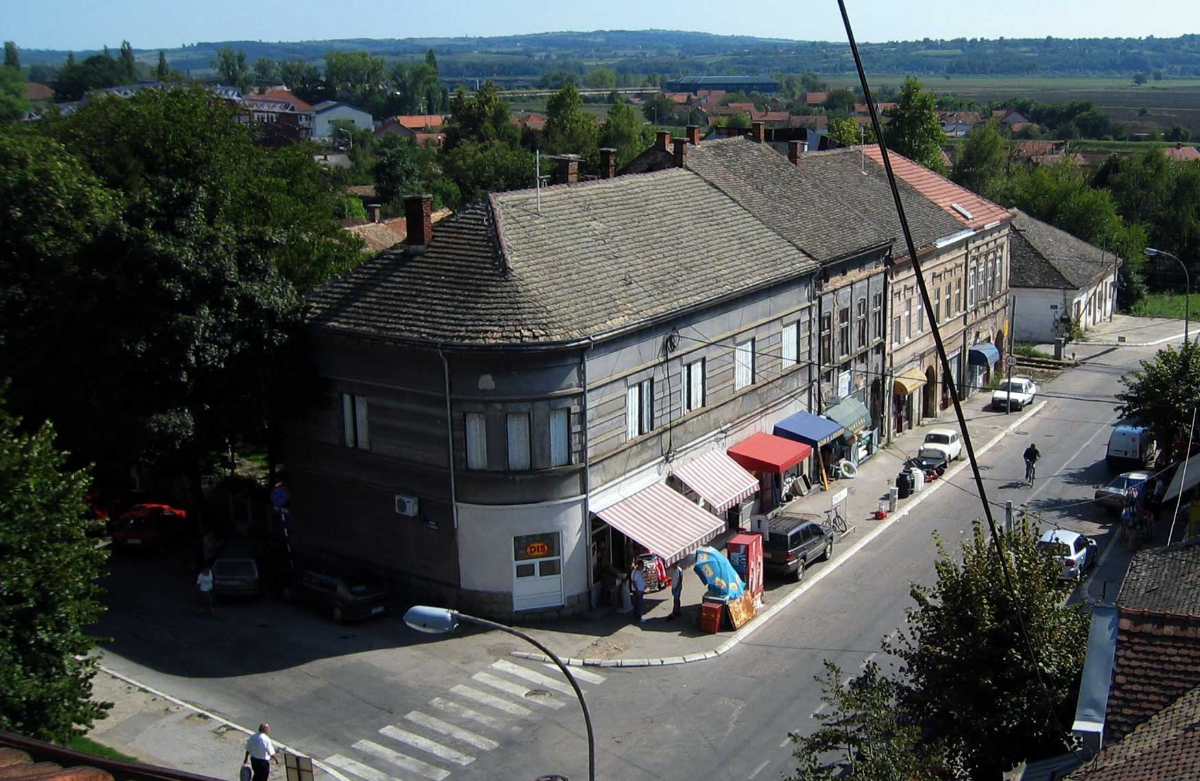 Зграда у Старој чаршији, најстаријем кварту Смедеревске Паланке.